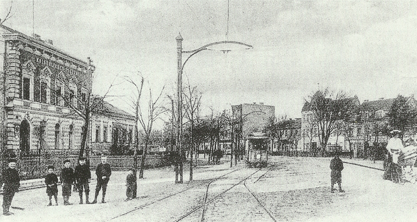 Zweiachsiger Triebwagen der Berliner Elektrischen Straßenbahn AG in der Berliner Straße in Französisch Buchholz um 1910.